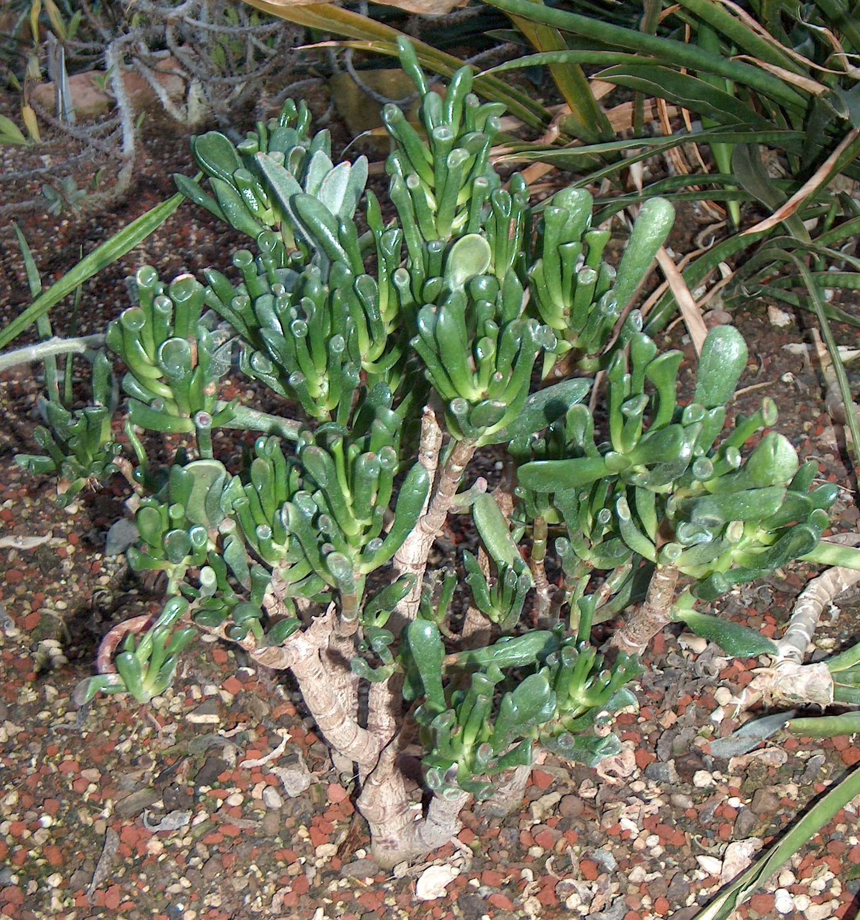 Crassula portulacea var. cristata Correct name is Crassula ovata. C. portulacea is a junior synonym. Dysmorodrepanis 21:23, 11 March 2007 (UTC) This variety is commonly known as Gollum Jade, Trumpet Jade, Hobbit's Pipe Jade, and ET's Fingers.[1]